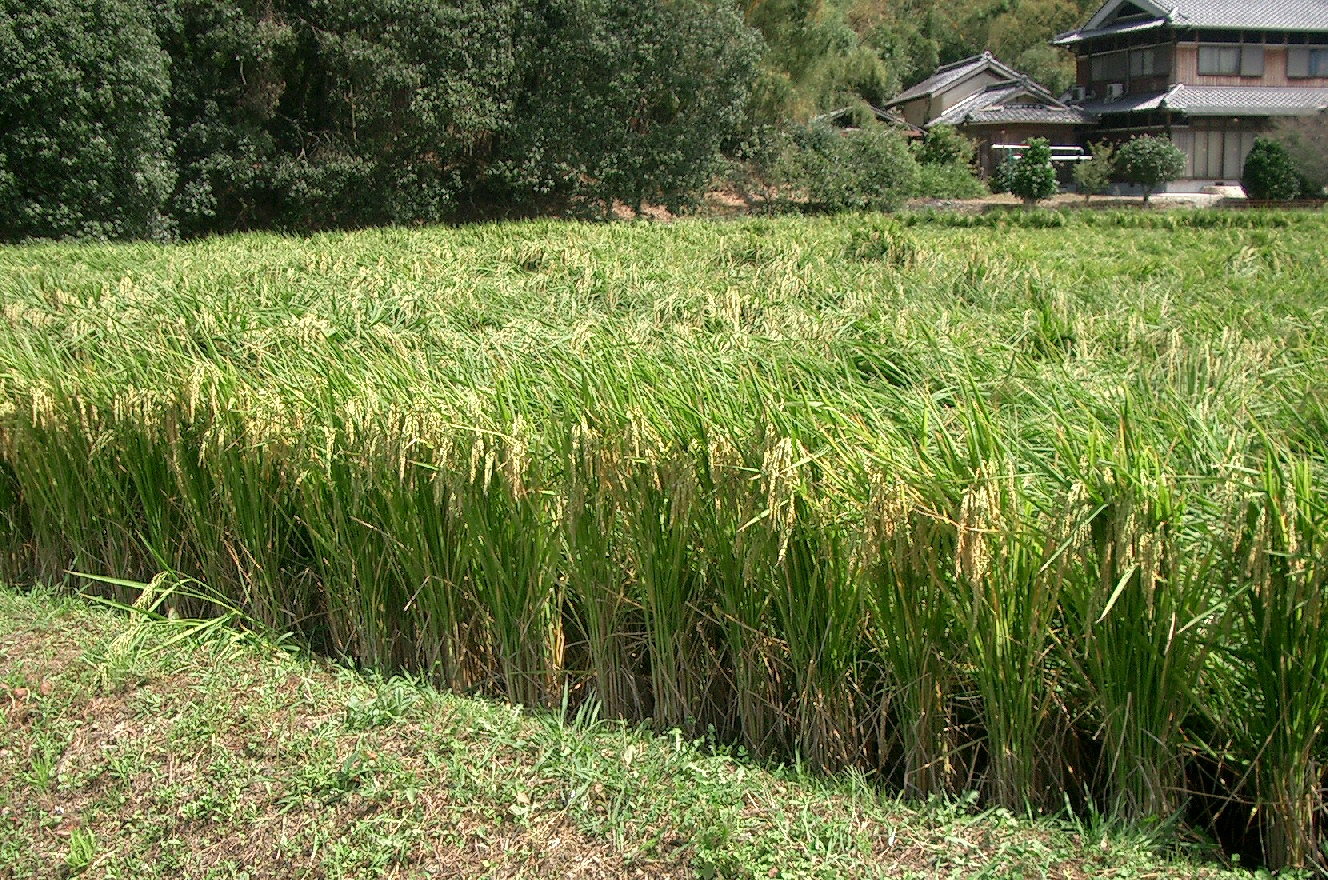 稲穂（宝塚市自然休養村：2004年9月12日撮影）